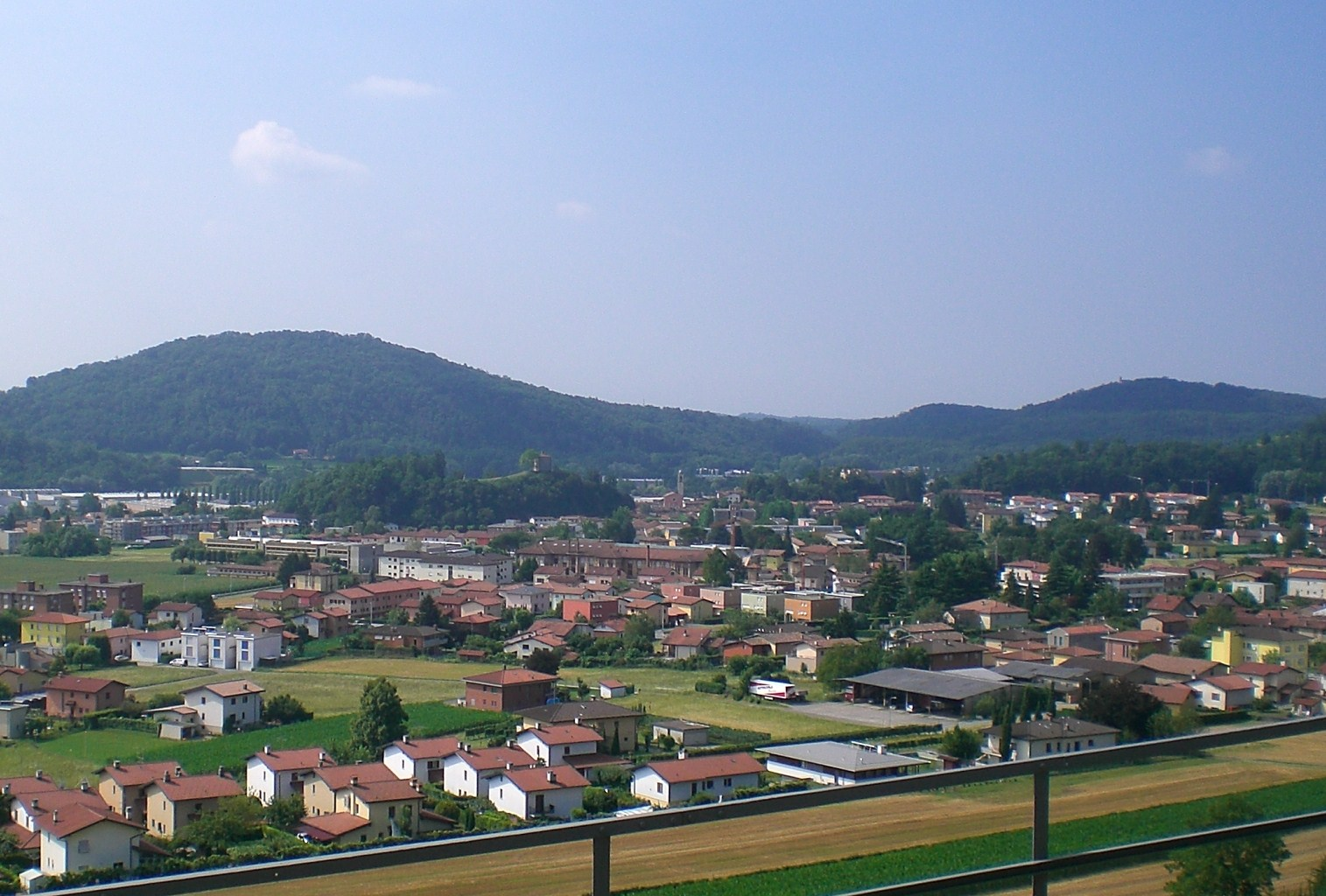 Panorama di Stabio